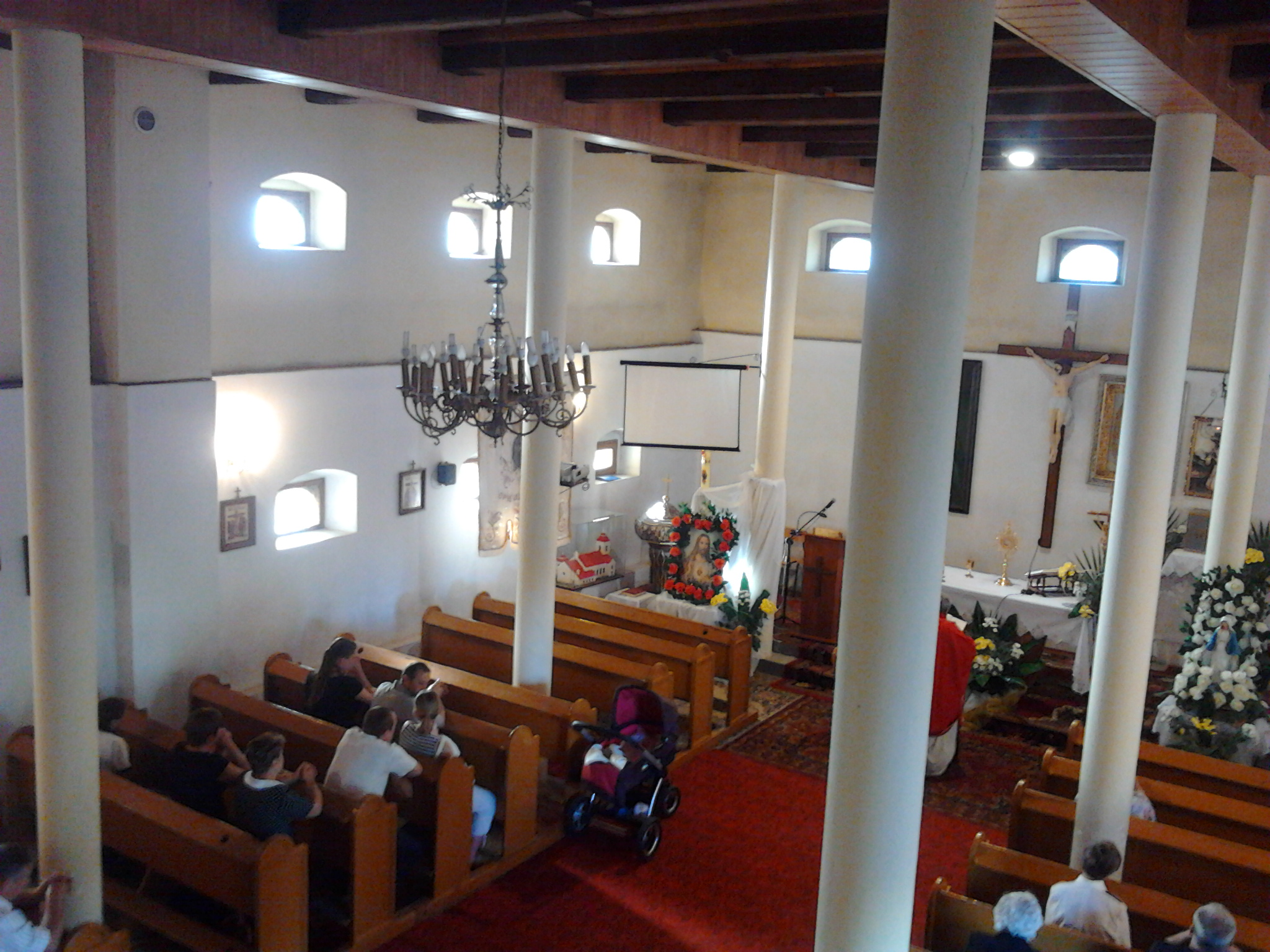 Wnętrze tymczasowej kaplicy parafii NMP z Guadalupe i św. Jana Diego w Żychlinie.